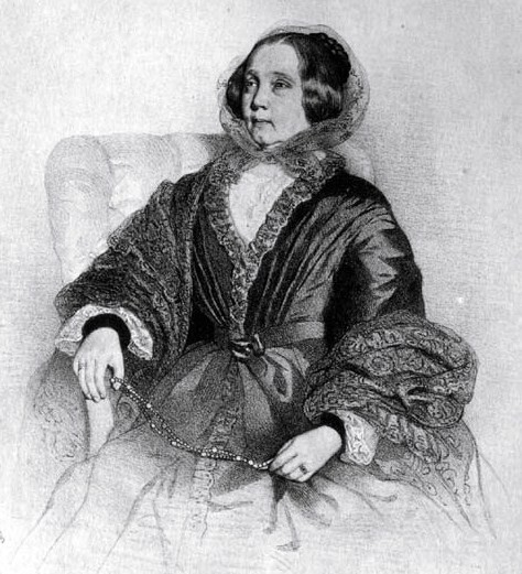 Елизавета Михайловна Сперанская, в замужестве Фролова-Багреева (1799 — 1857)